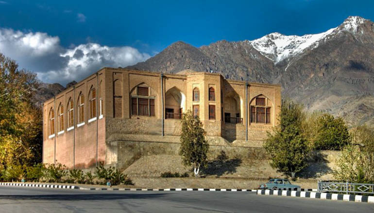 Ordubad cümə məscidi ümumi görünüş